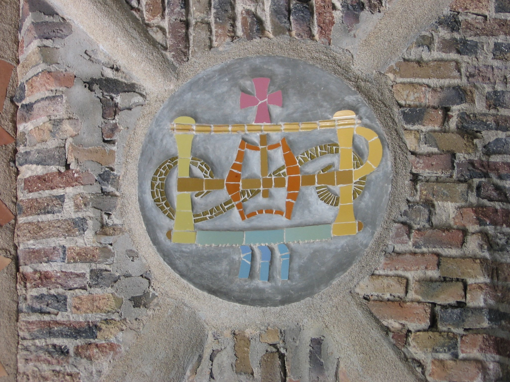 Cripta de la Colonia Güell, de Antoni Gaudí (Santa Coloma de Cervelló)